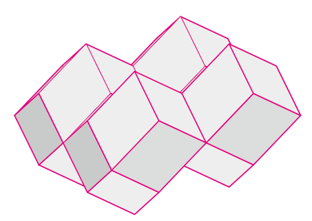 菱形12面体ボロノイ